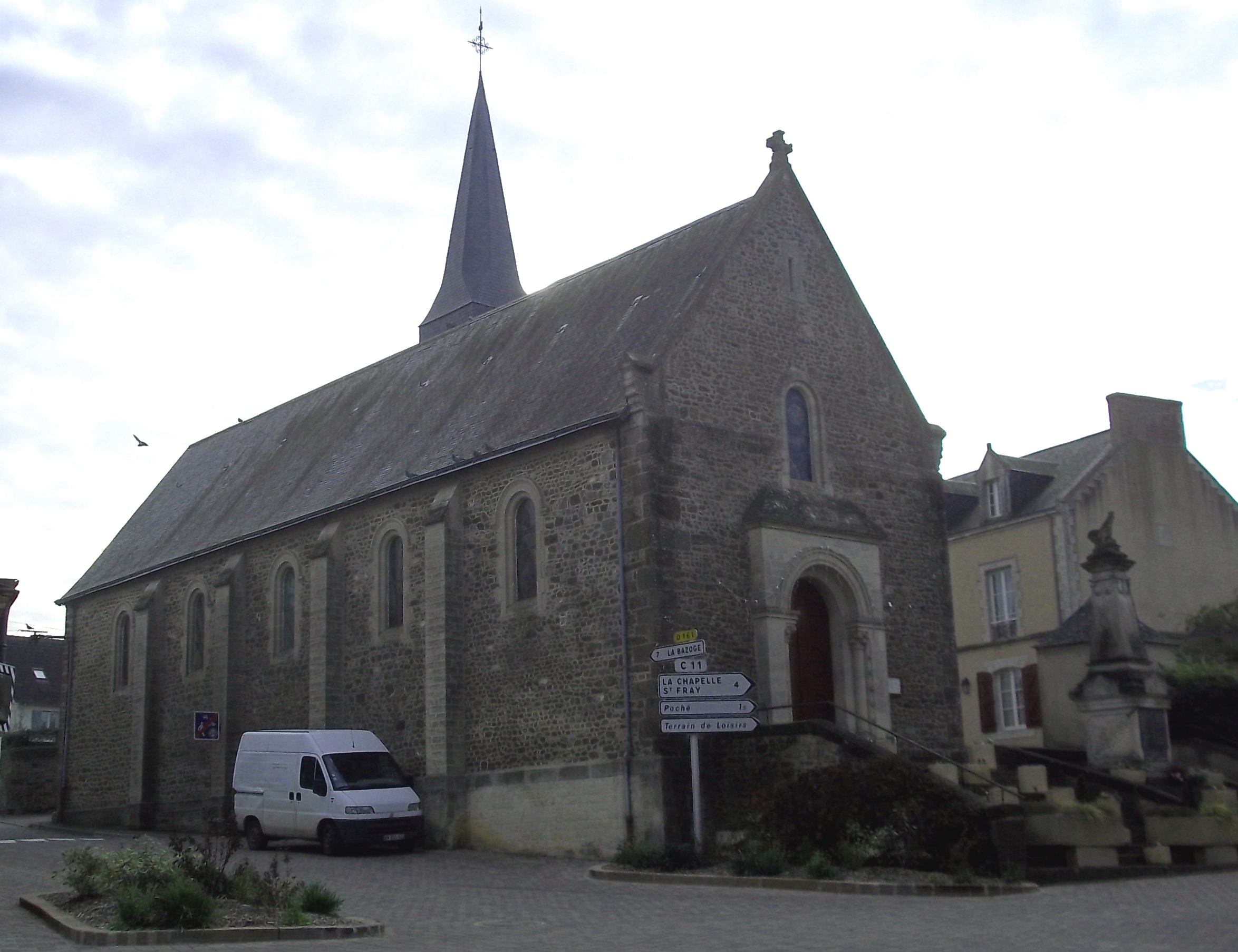 l'Eglise de Sainte-Sabine-sur-Longève